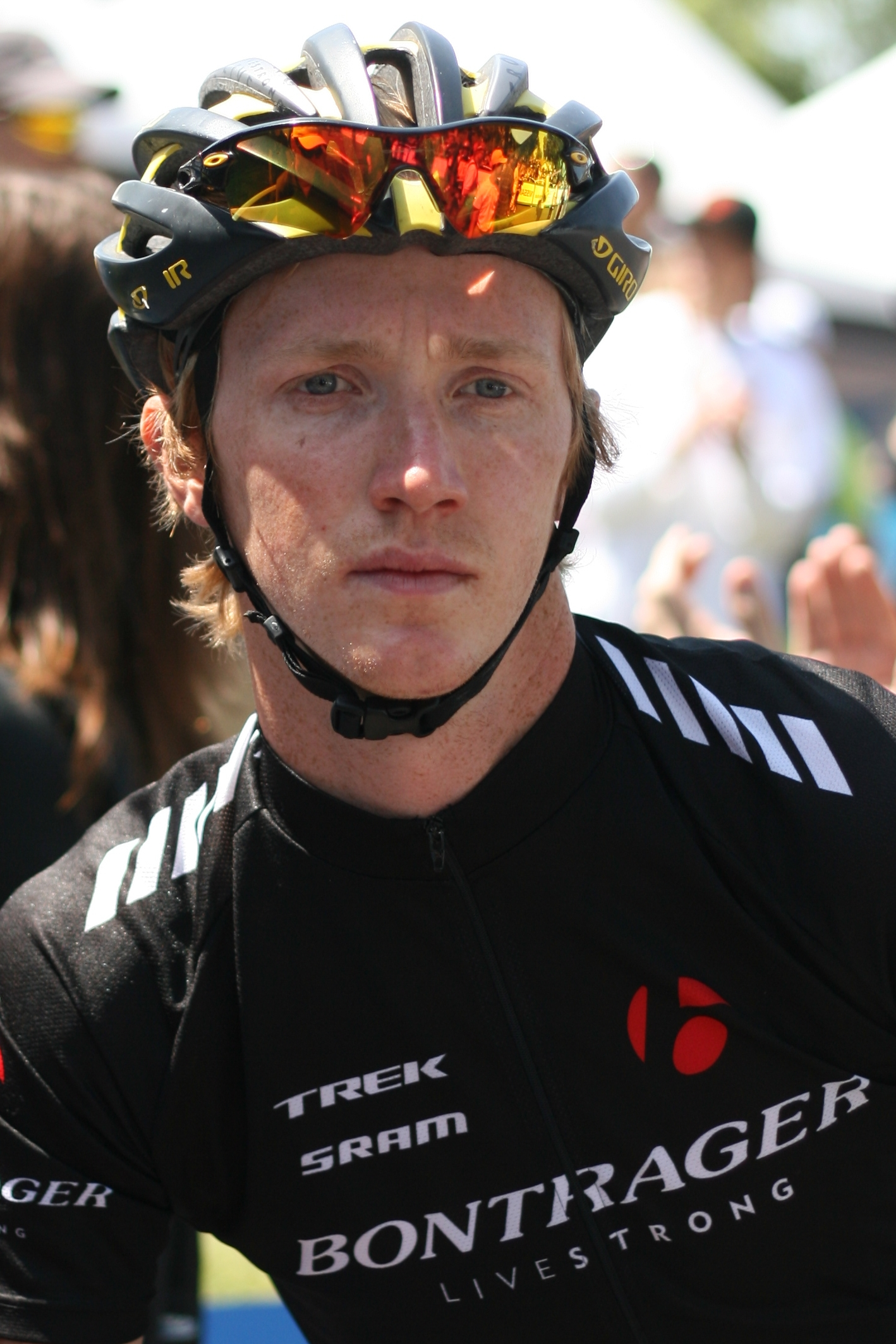 2e étape (Santa Cruz) du Tour de Californie